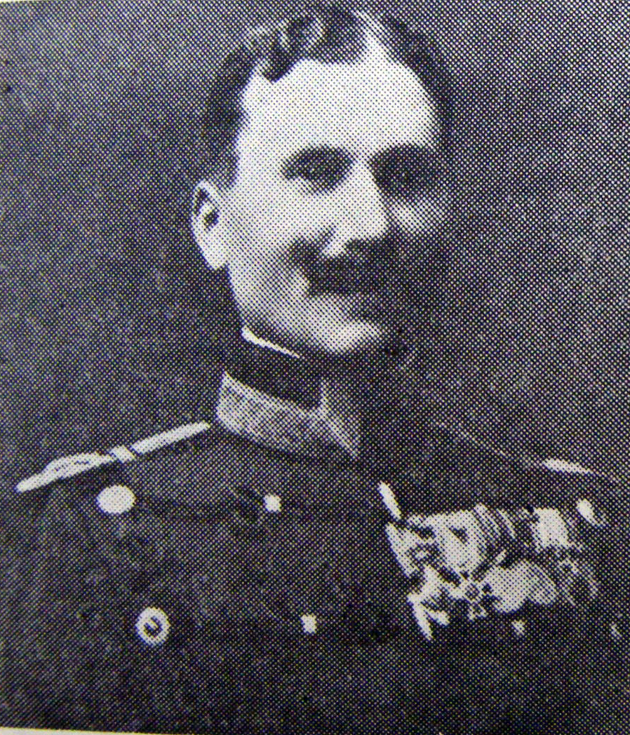 Generalul David Praporgescu - Sursa - fotocopie proprie din lucrarea : România în anii primului Război Mondial, Editura Militară, București, 1987 - Imaginea este în domeniul public din 1992, conform art. 7 din Decretul nr.321 din 18 iunie 1956